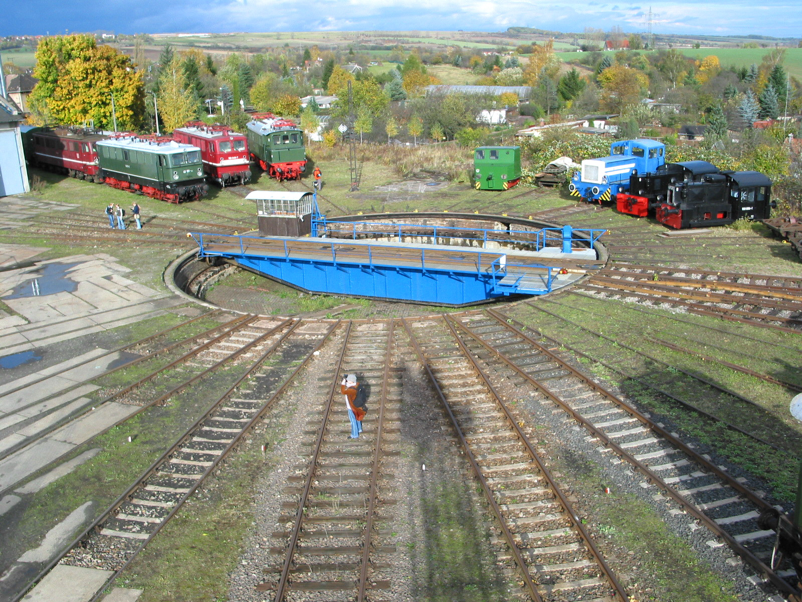 Das Eisenbahnmuseum Weimar des Thüringer Eisenbahnvereins e. V. (TEV) auf dem Gelände des ehem. Bahnbetriebswerks Weimar an der Eduard-Rosenthal-Straße. - Blick auf die Drehscheibe mit den Lokomotiven.